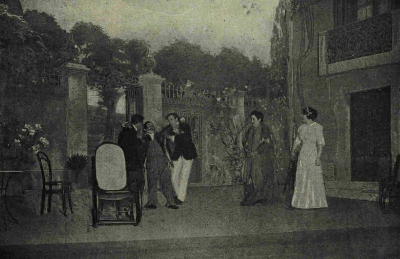 Torre Torretes obra de teatre de Josep Burgas